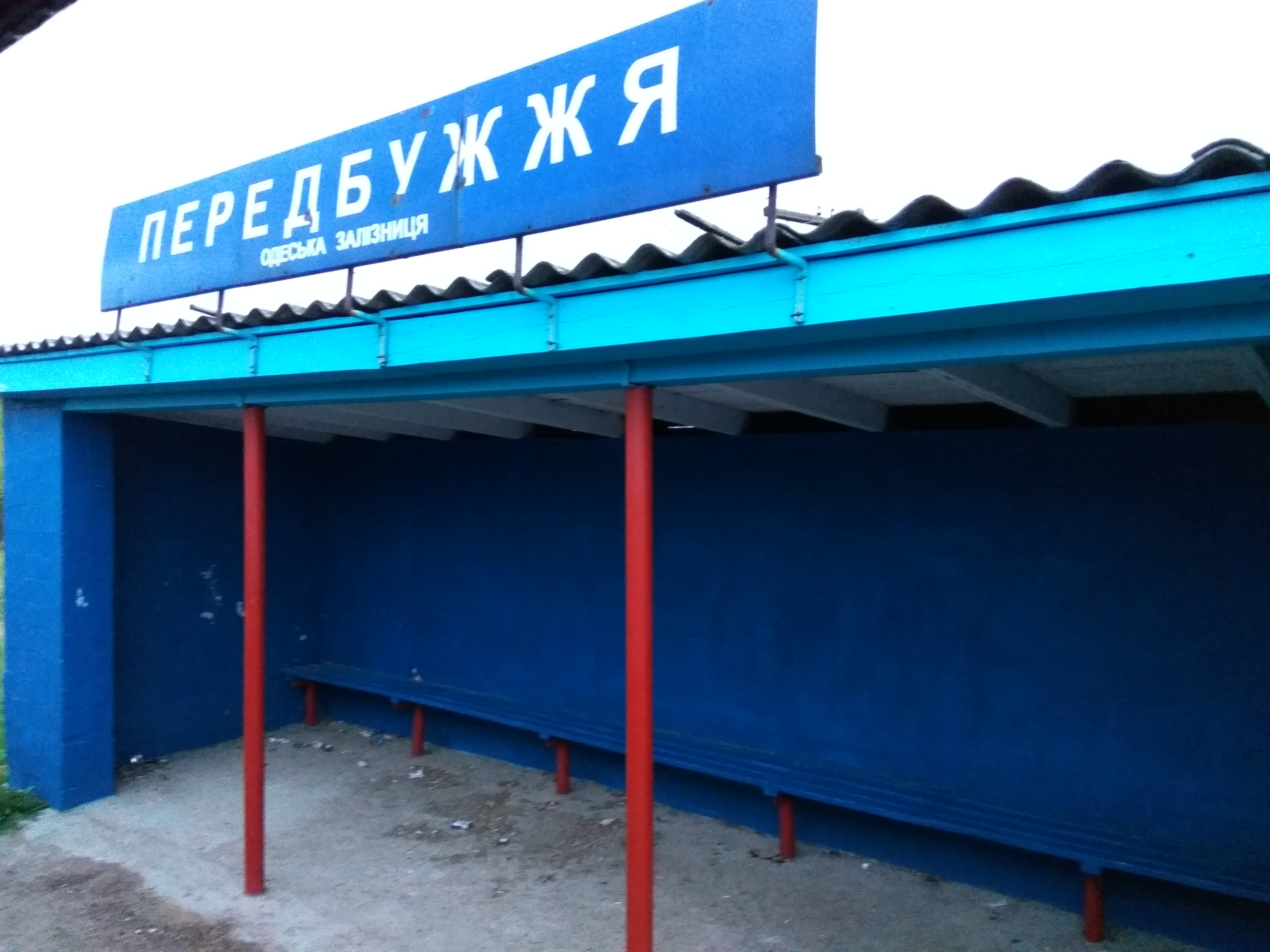 з.п. Передбужжя